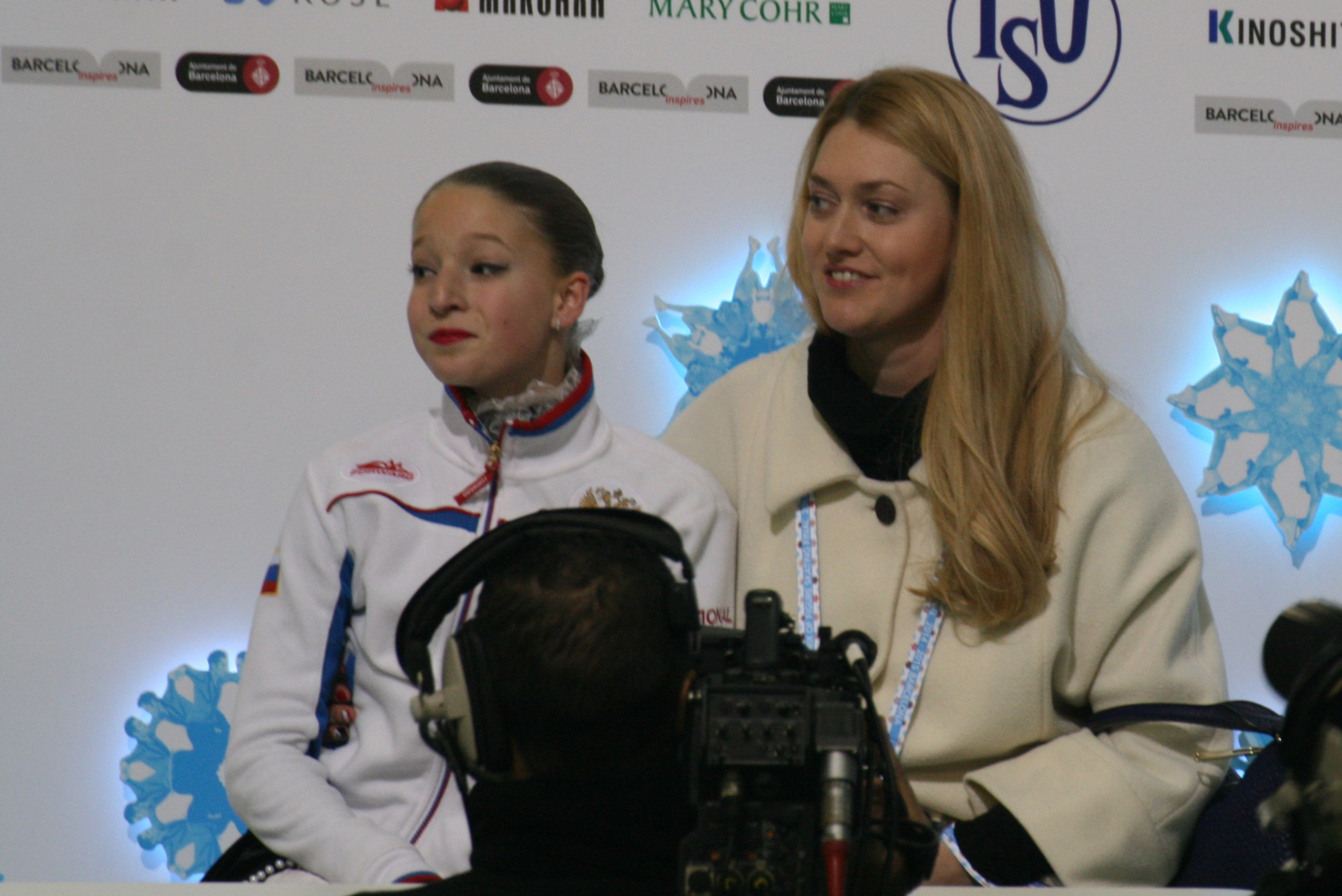 Мария Сотскова (Россия) со своим тренером Светланой Пановой на финале Гран-при по фигурному катанию среди юниоров 2014-2015.